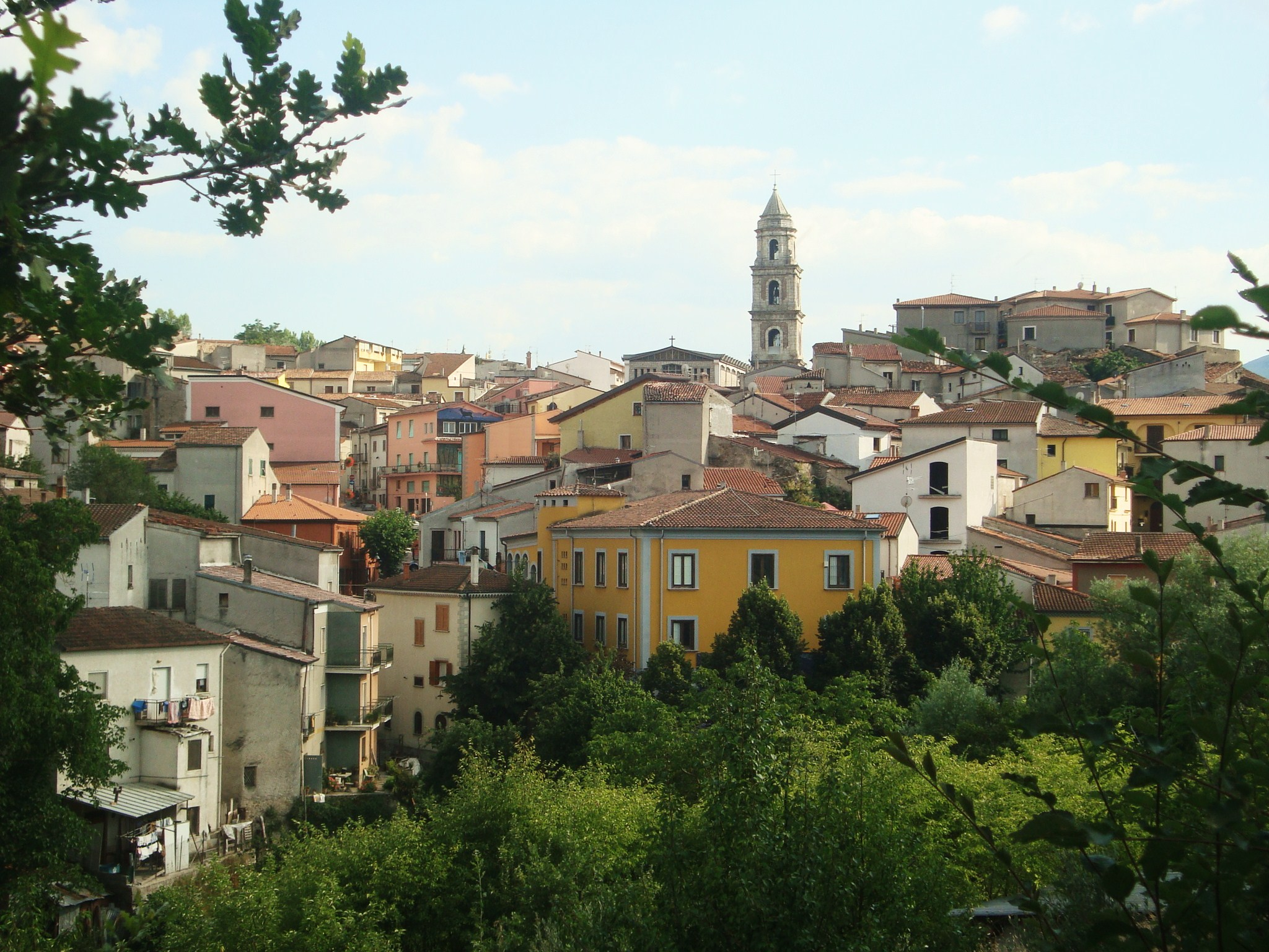 Satriano_di_Lucania-Stemma.png